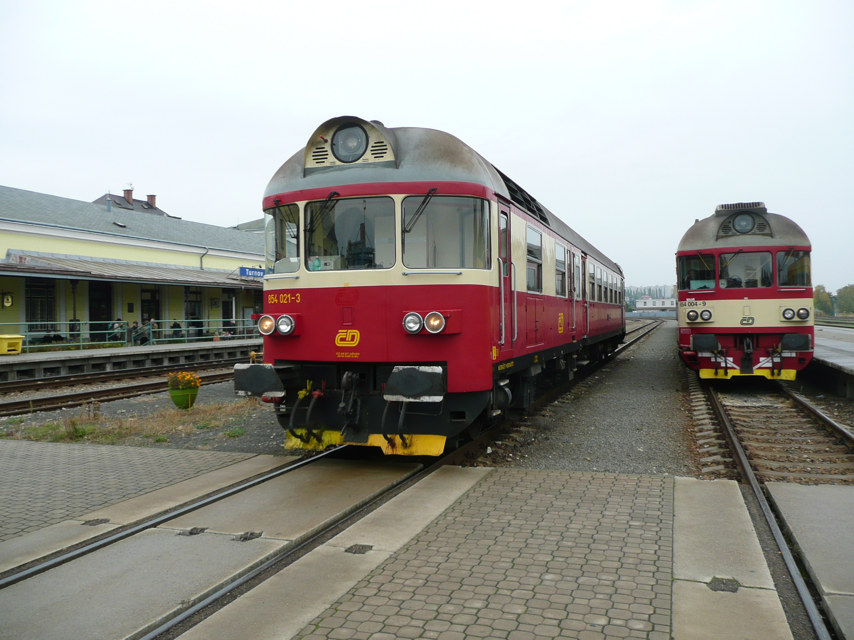 M 296.1021 in der Ursprungslackierung neben 854.004 im neuesten Design im Bahnhof Turnov